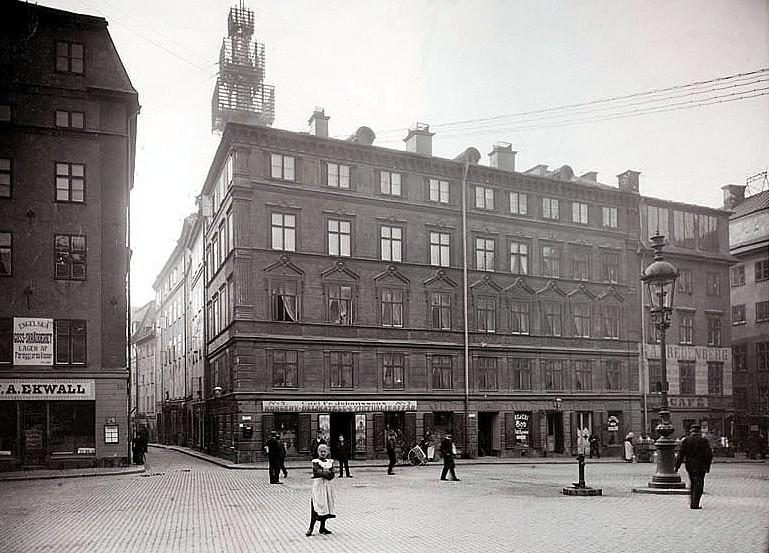 Kvarteret Ceres, Stortorget mot söder. Svartmangatan till vänster